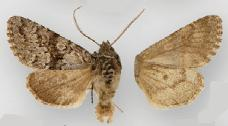 Lasionycta subfuscula subfuscula male